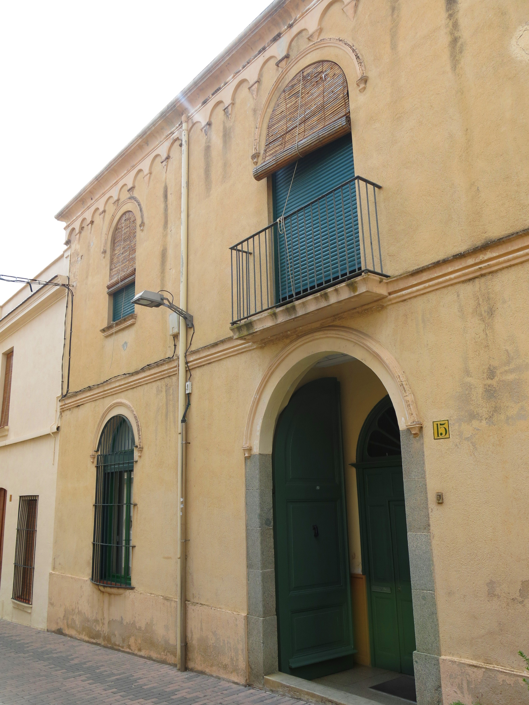 Rectoria de la parròquia de Sant Cristòfol (Premià de Mar)